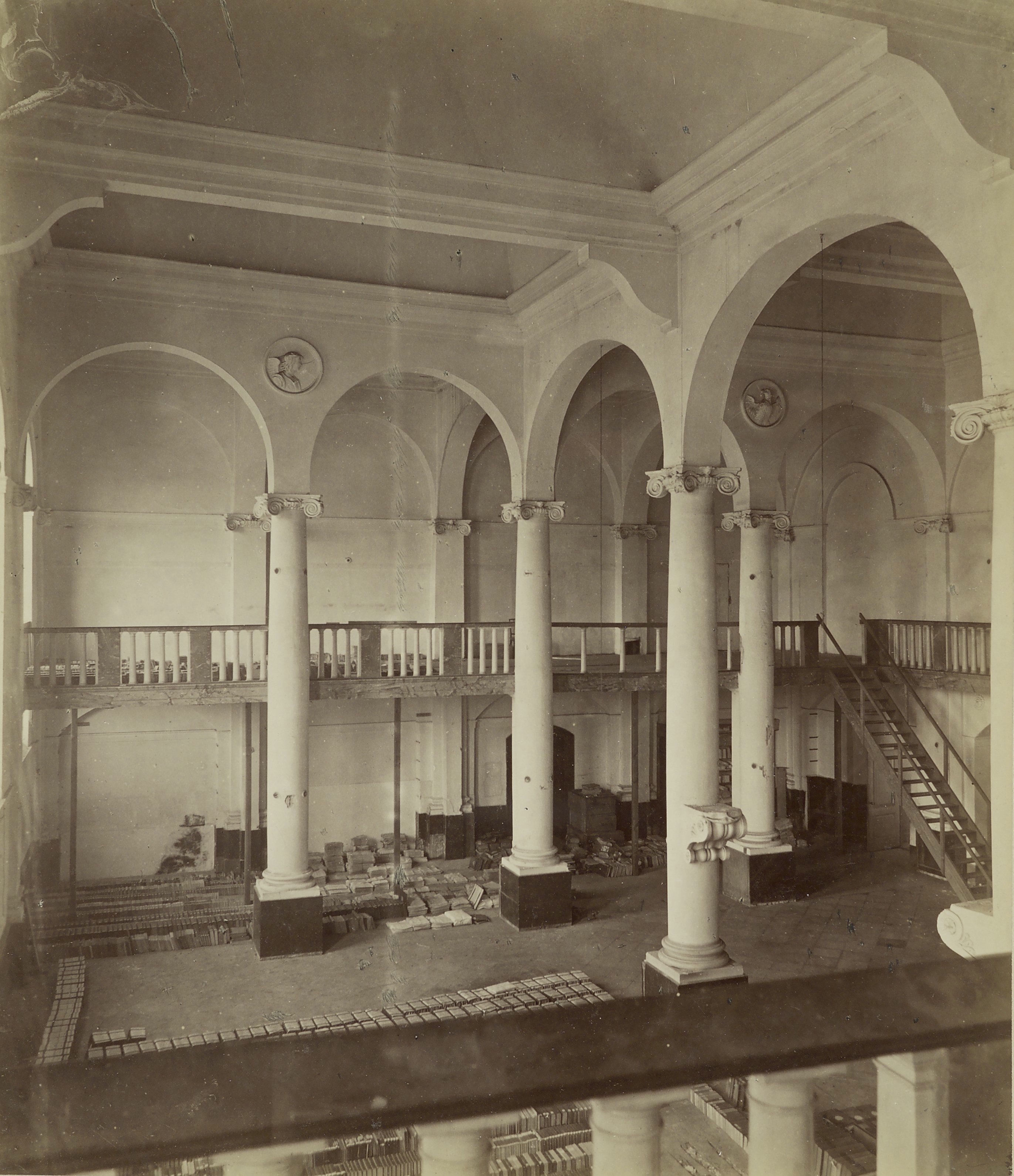 Binnenhofcomplex Hofkapel: Interieur gezien vanaf galerij (opmerking: Bureau Mulder)